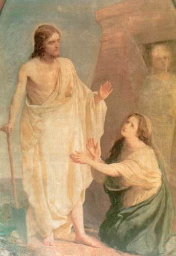 Spotkanie Zmartwychwstałego z Marią Magdaleną, oil on canvas, 278 × 136, ołtarz ewangelickiego kościoła Zbawiciela, Parafia Ewangelicko-Augsburska w Tomaszowie Mazowieckim